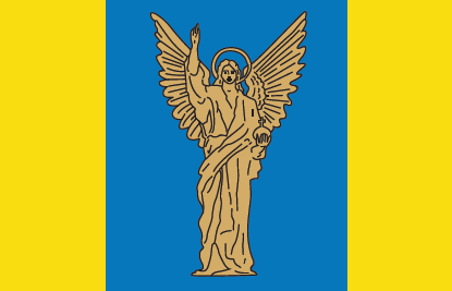 Прапор Підволочиського району